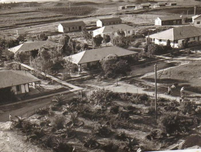 חצר ניר-עם 1950